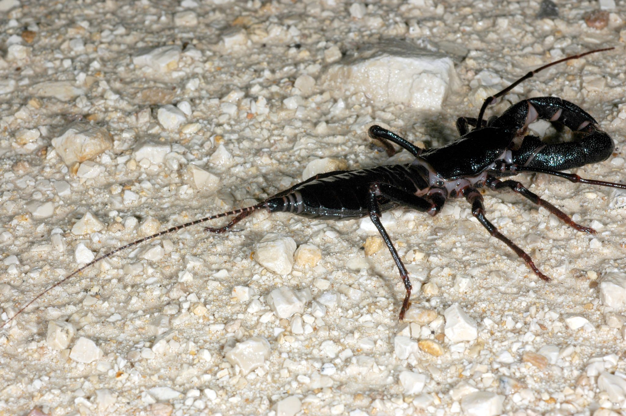 Vinegaroon (Mastigoproctus giganteus)